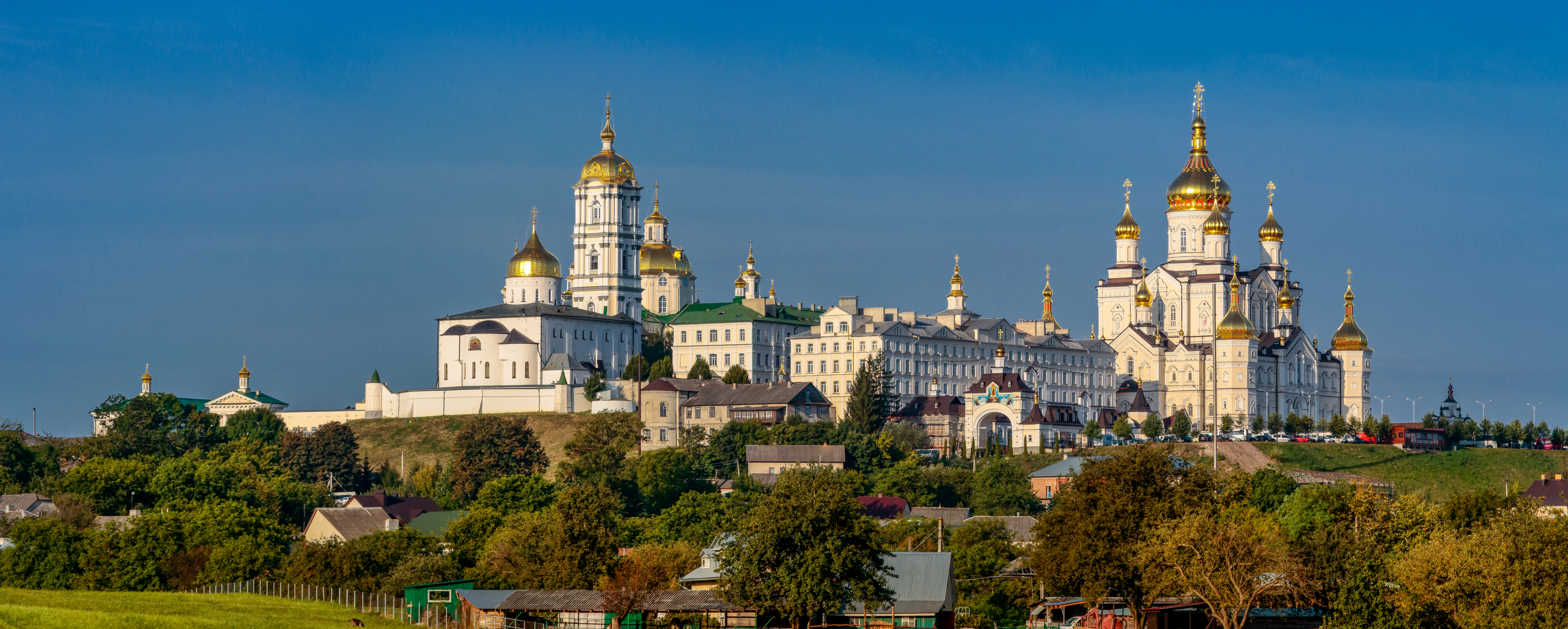 Почаївська лавра, Почаїв, пл. Возз'єднання